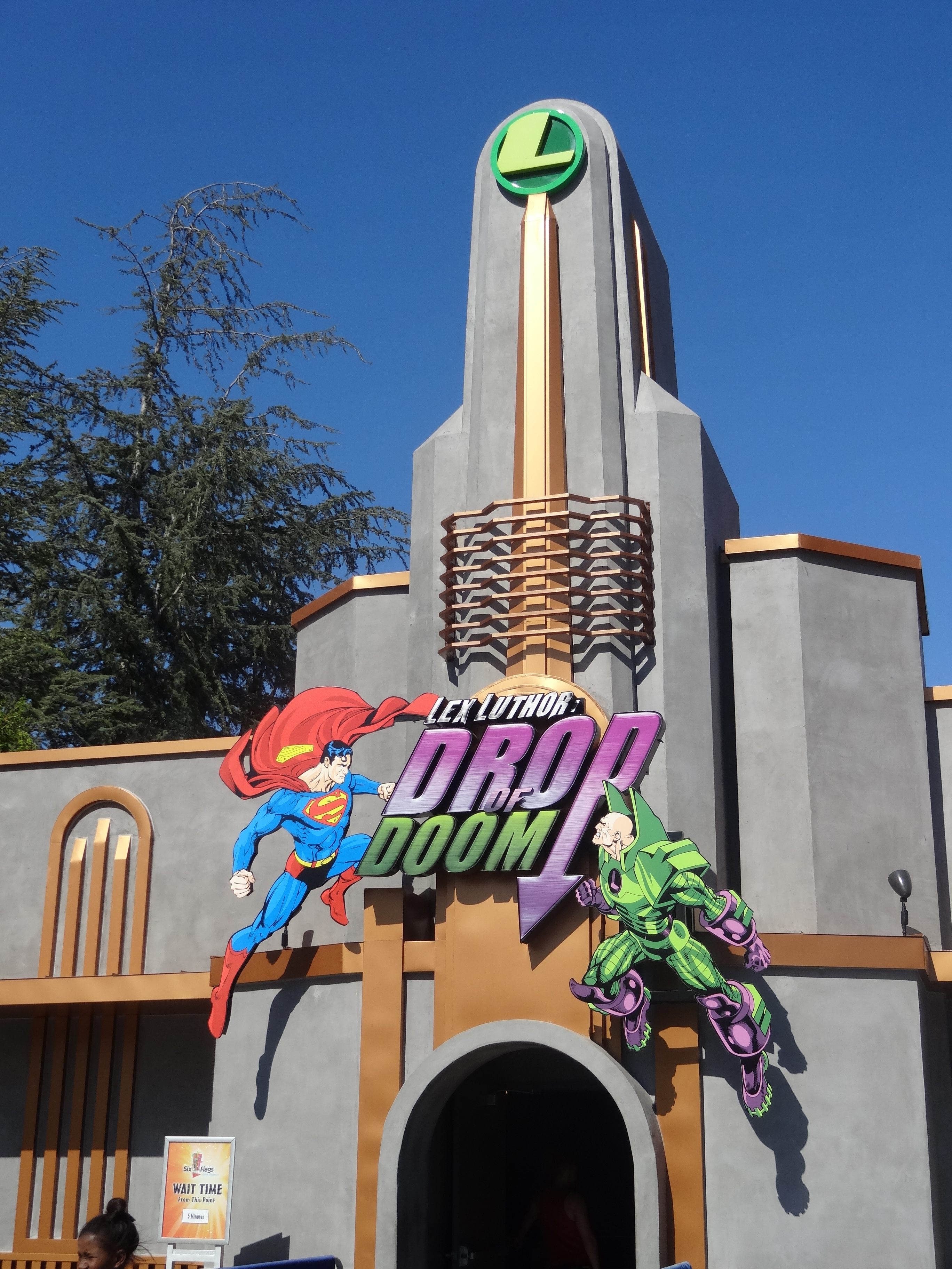 Entrée de Lex Luthor, Drop of Doom à Six Flags Magic Mountain.